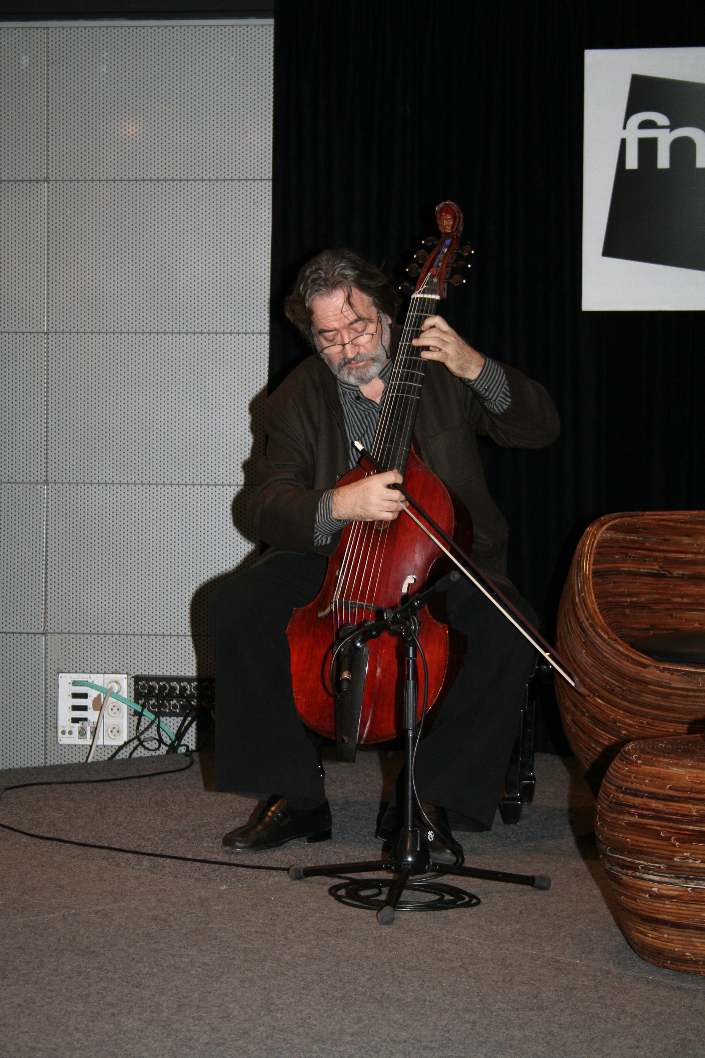 Rencontre avec Jordi Savall organisée par la Fnac des Ternes (Paris, France) pour la sortie de l'album Paradis perdus Christophorus Colombus.